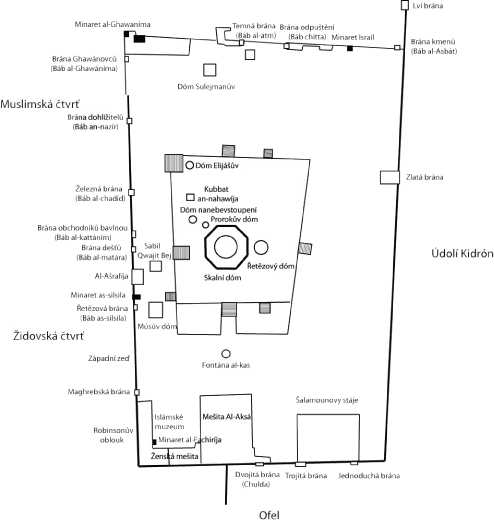 Temple mount plan